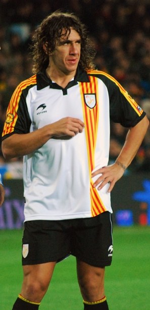 Puyol, amb la selecció de Catalunya, en un partit contra Argentina.